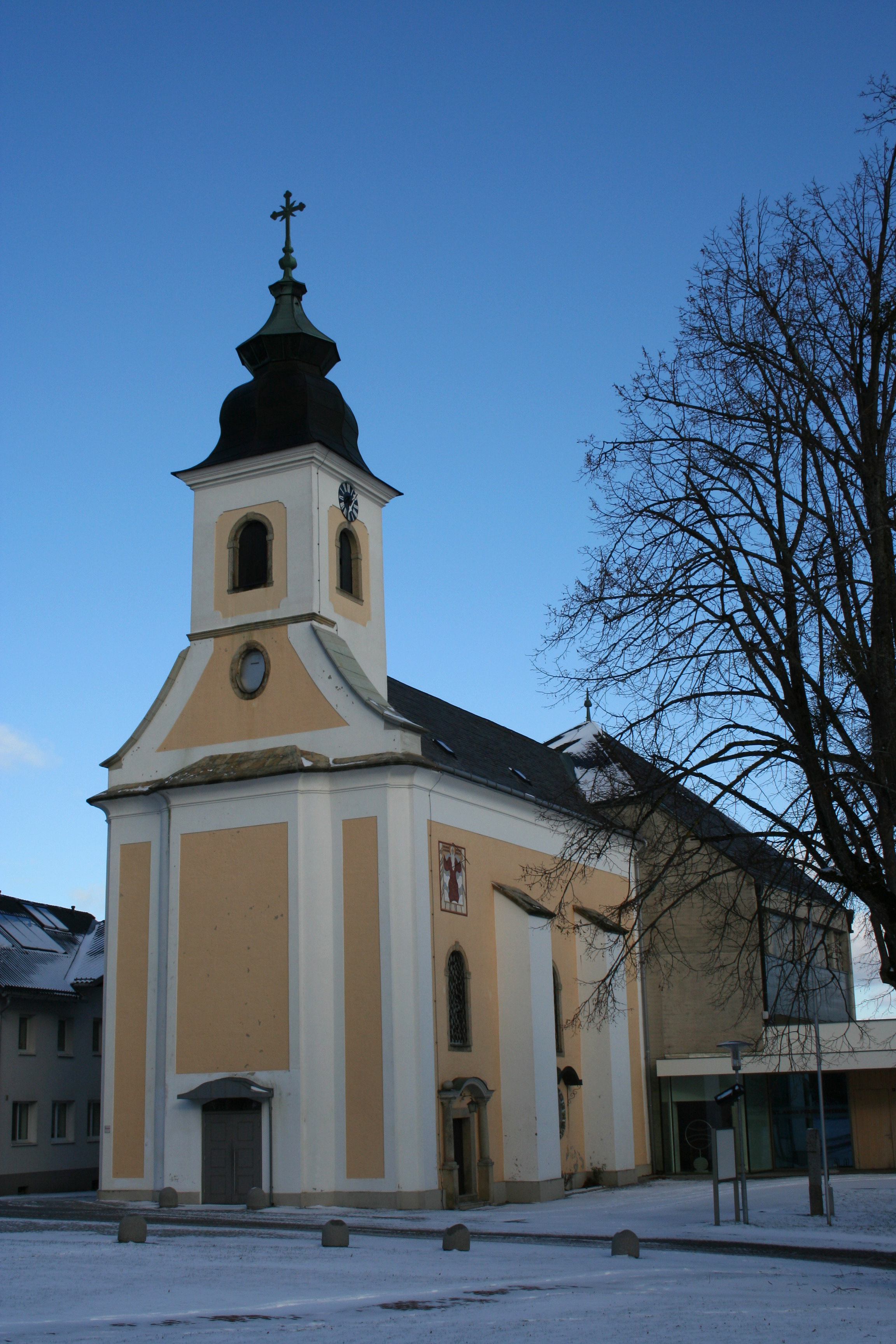 Kath. Pfarrkirche hl. Anna